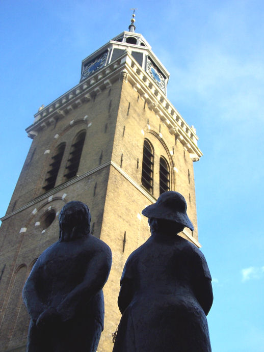 Jouster toren met beeldje van Annet Haring